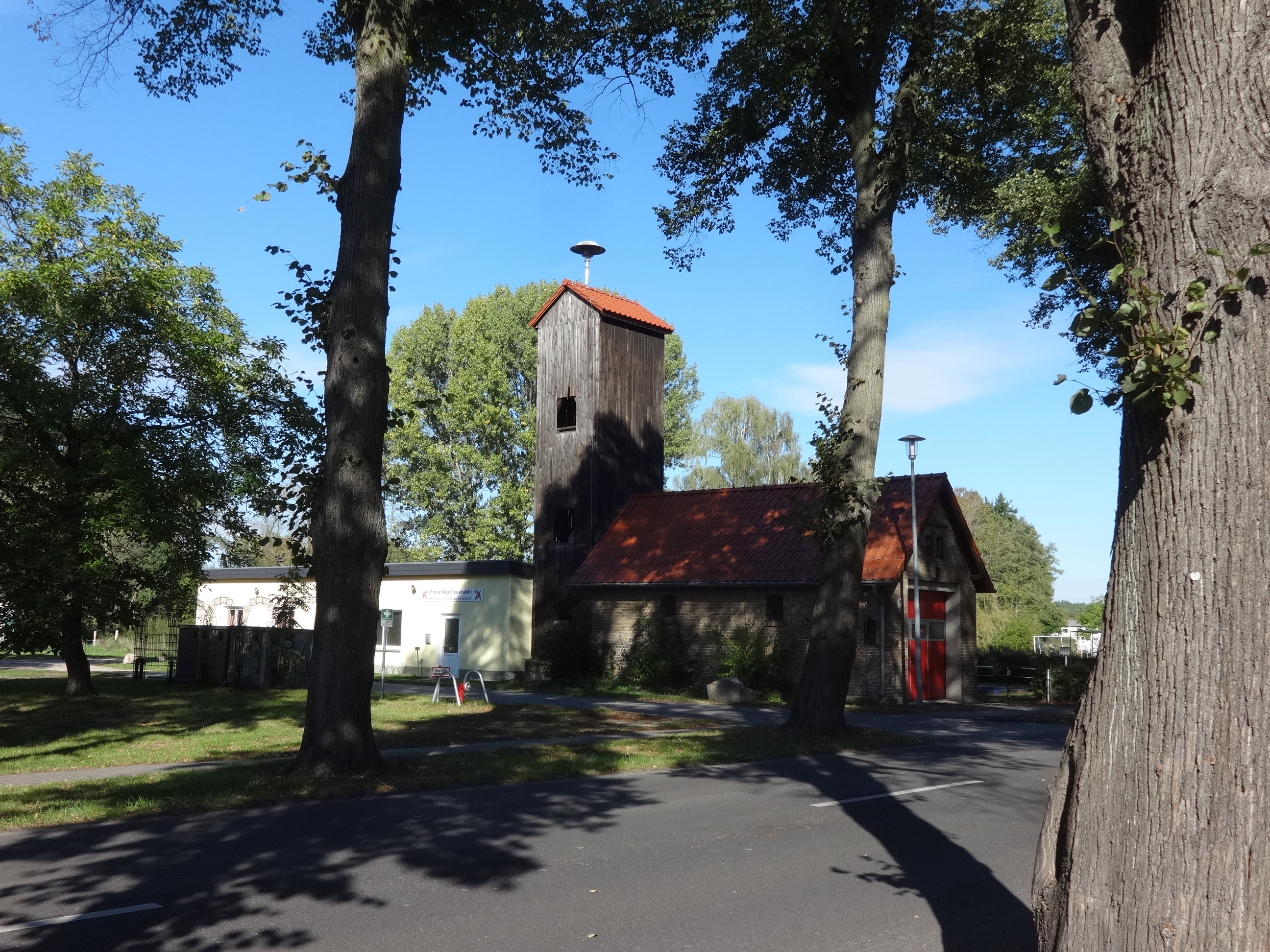 Klein Schulzendorf, ein Ortsteil der Stadt Trebbin im Landkreis Teltow-Fläming in Brandenburg